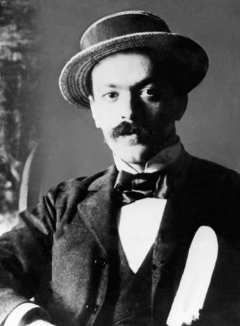 Italo Svevo, scrittore italiano. Fotografia scattata tra il it:1875 e il it:1910.